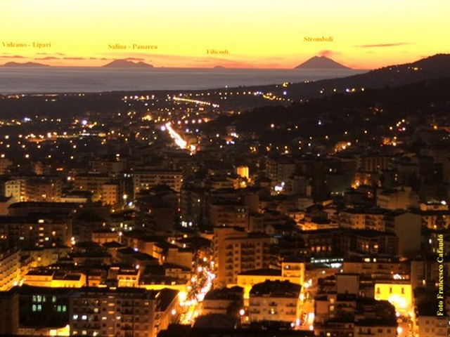 Notturno di Lamezia con le Isole Eolie. La foto è stata scattata il 30 marzo 2004 dalla Collina del Soccorso e ritrae tutte le Isole dell'arcipelago messinese, tranne Alicudi perchè nacosta dalla sagoma dello Stromboli. Autore: Francesco Cataudo. La foto è presente anche sul Sito Web dello stesso autore al link: .